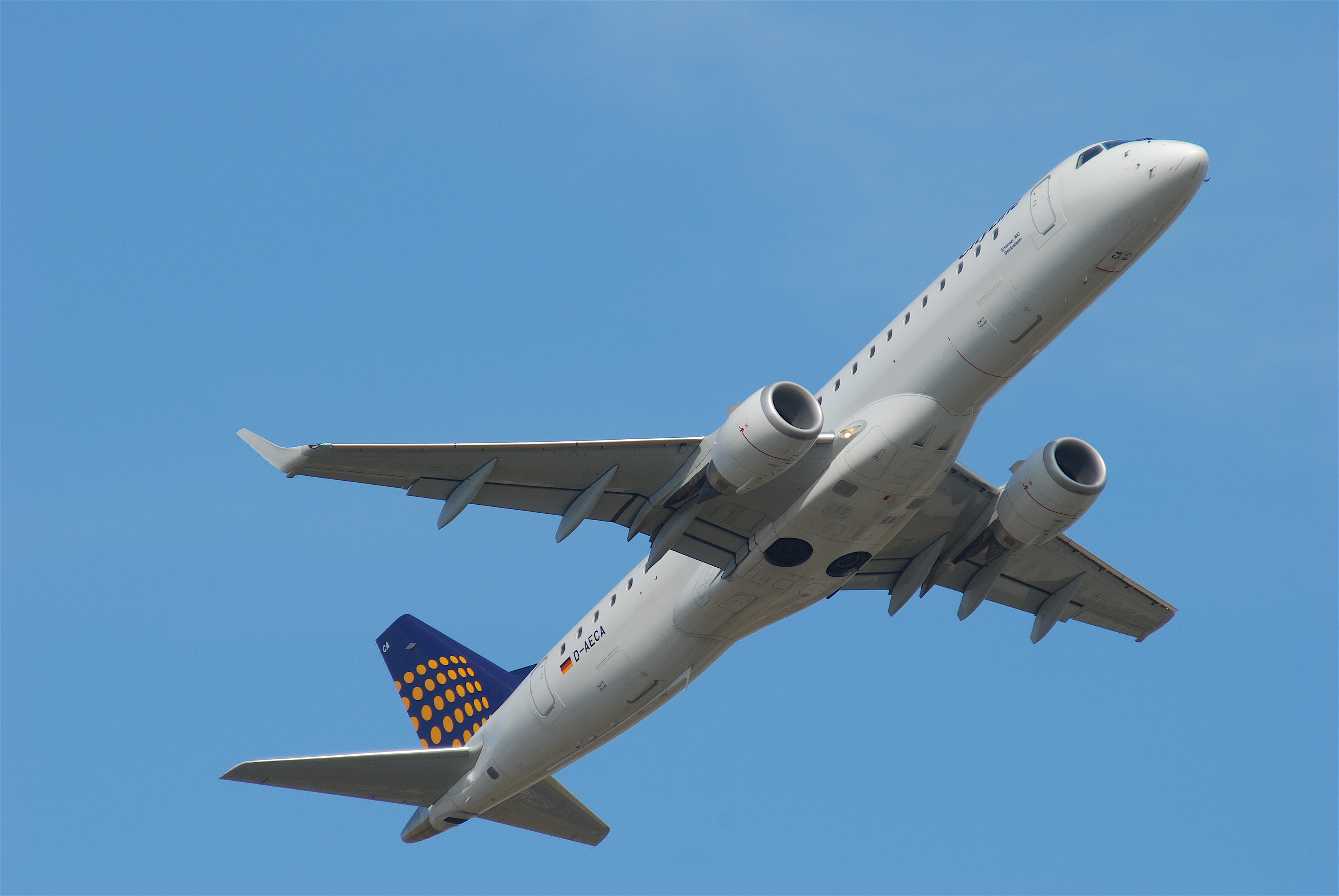 D-AECA@FRA;09.07.2010/581ch